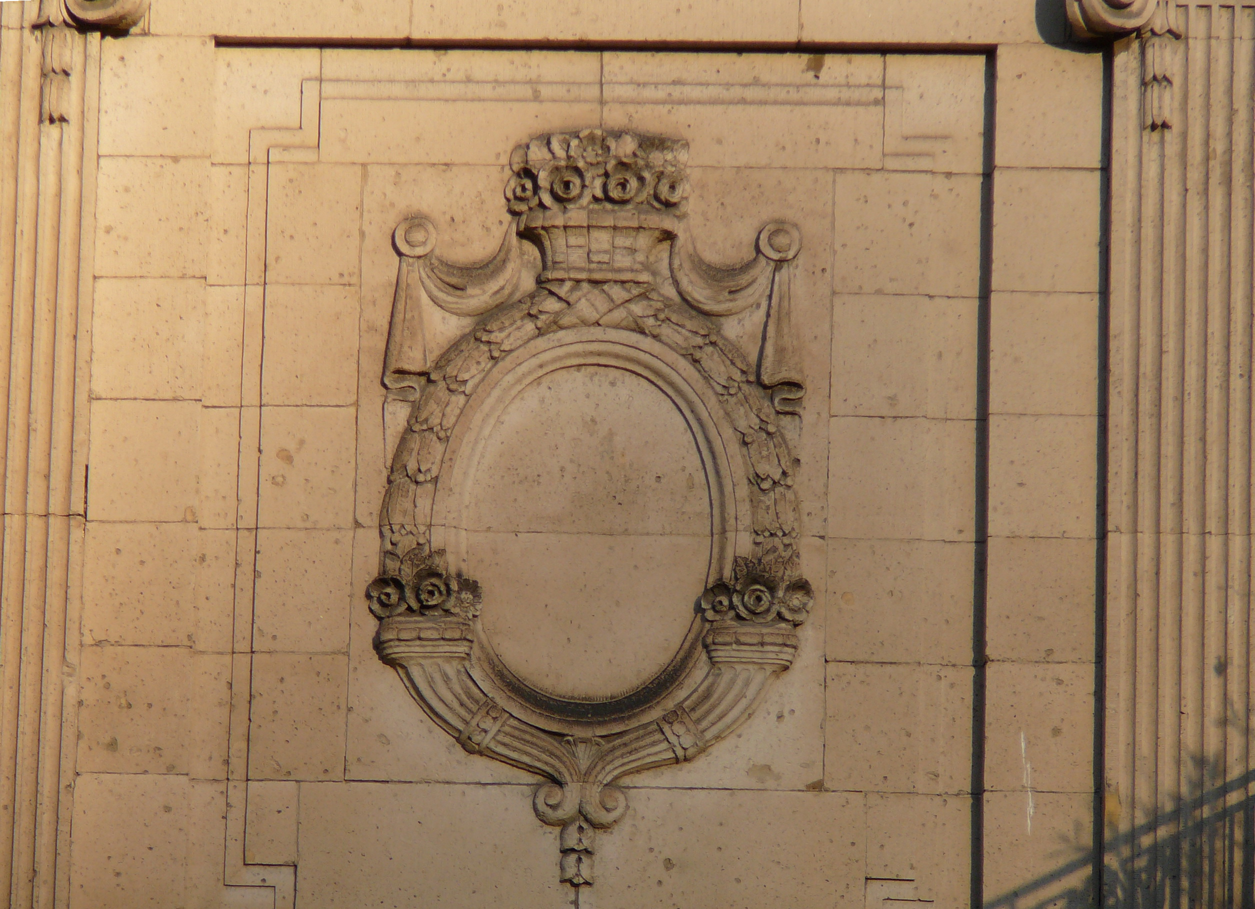 Am Buschhäuschen 70, Wuppertal